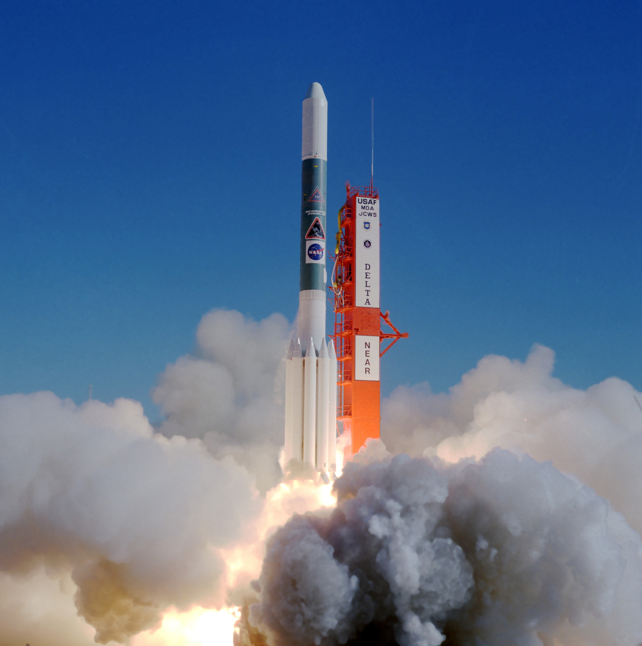 NEAR launch